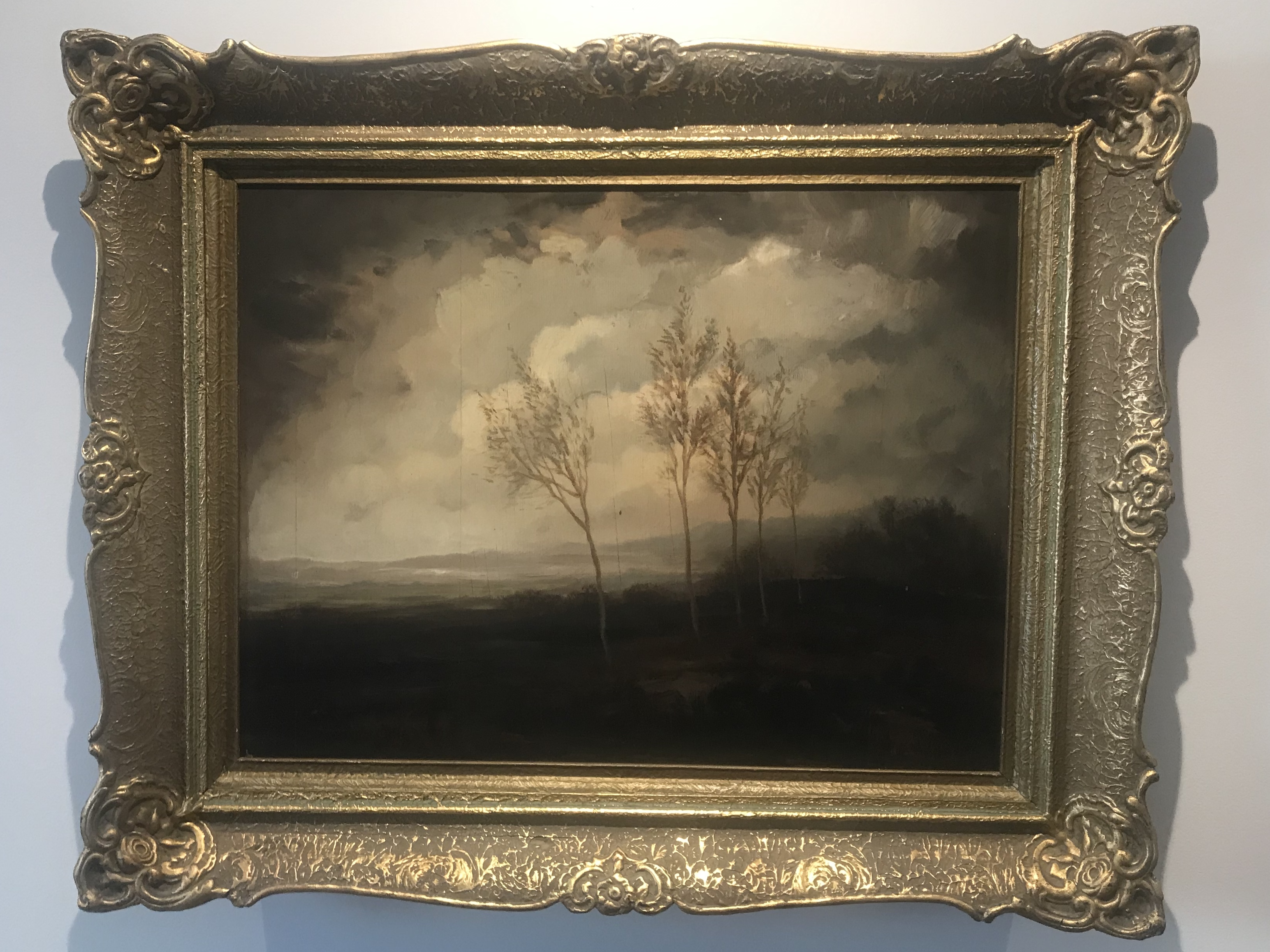 Noc pred búrkou